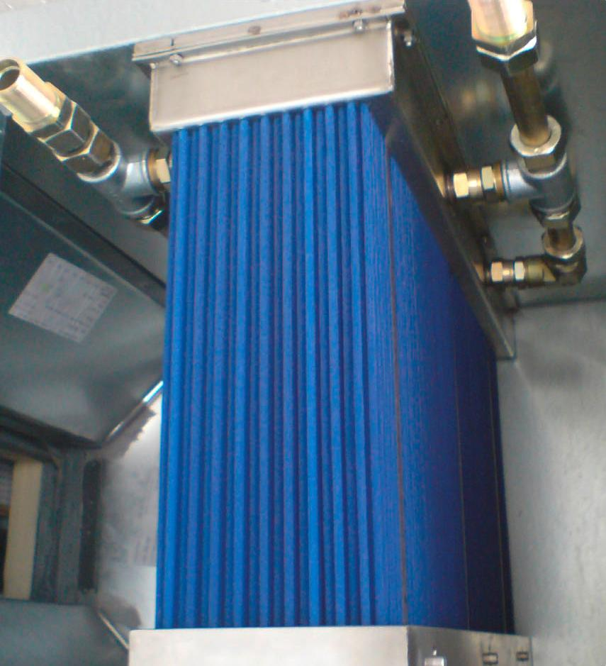 Filter, arbeitet nach dem regenerierbaren Fallfilmprinzip